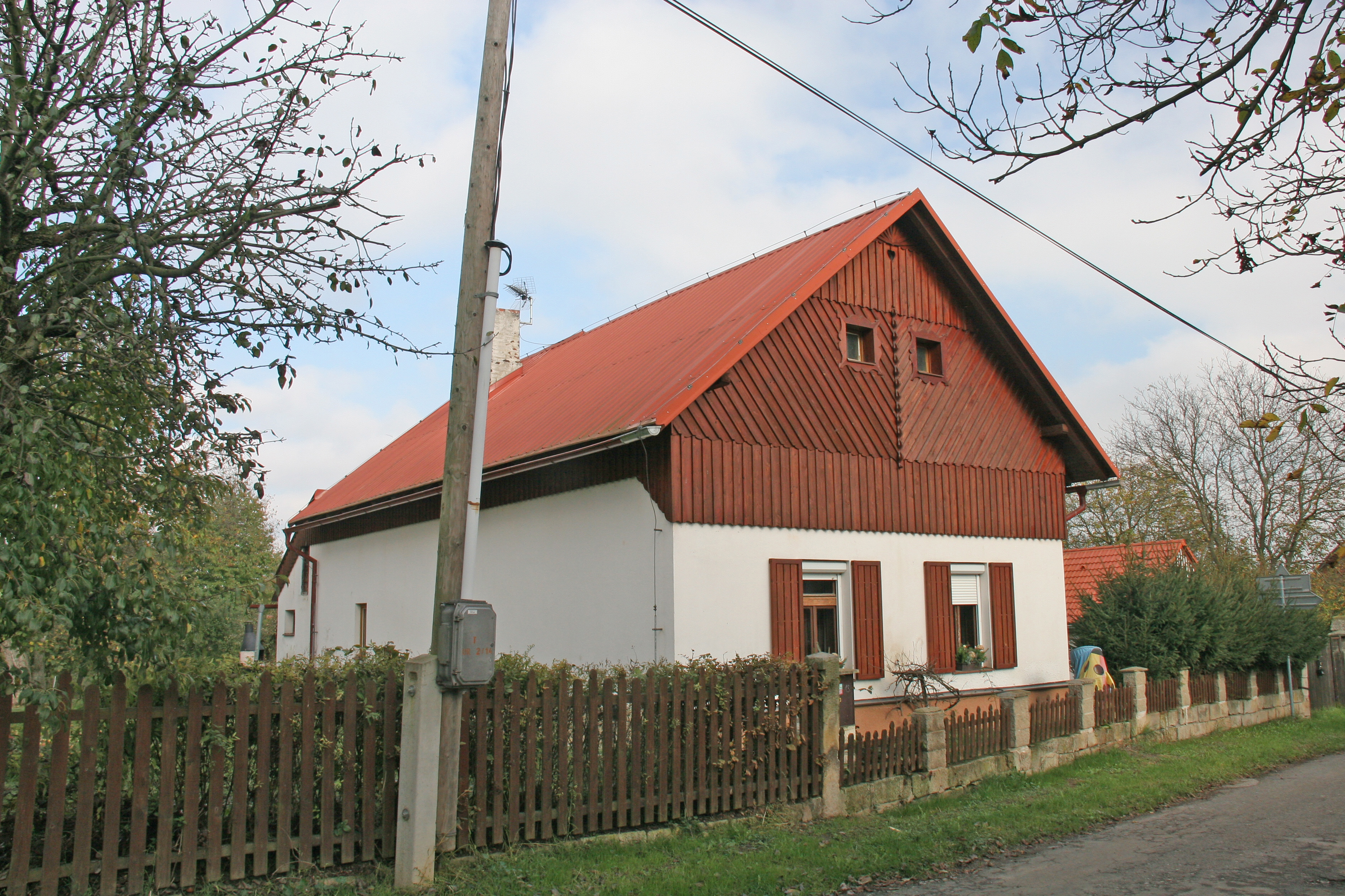 Vesec 13